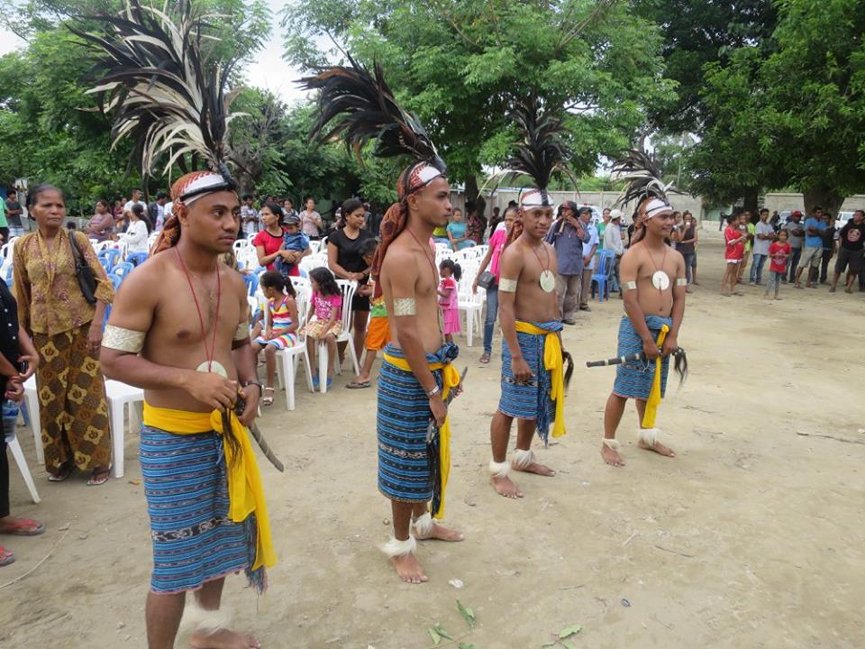 Tänzer in traditioneller Tracht in Fatuhada